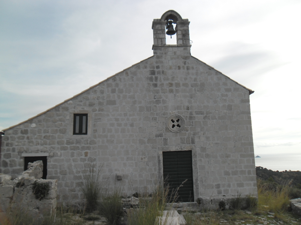 crkva na Pakljeni, otok Šipan